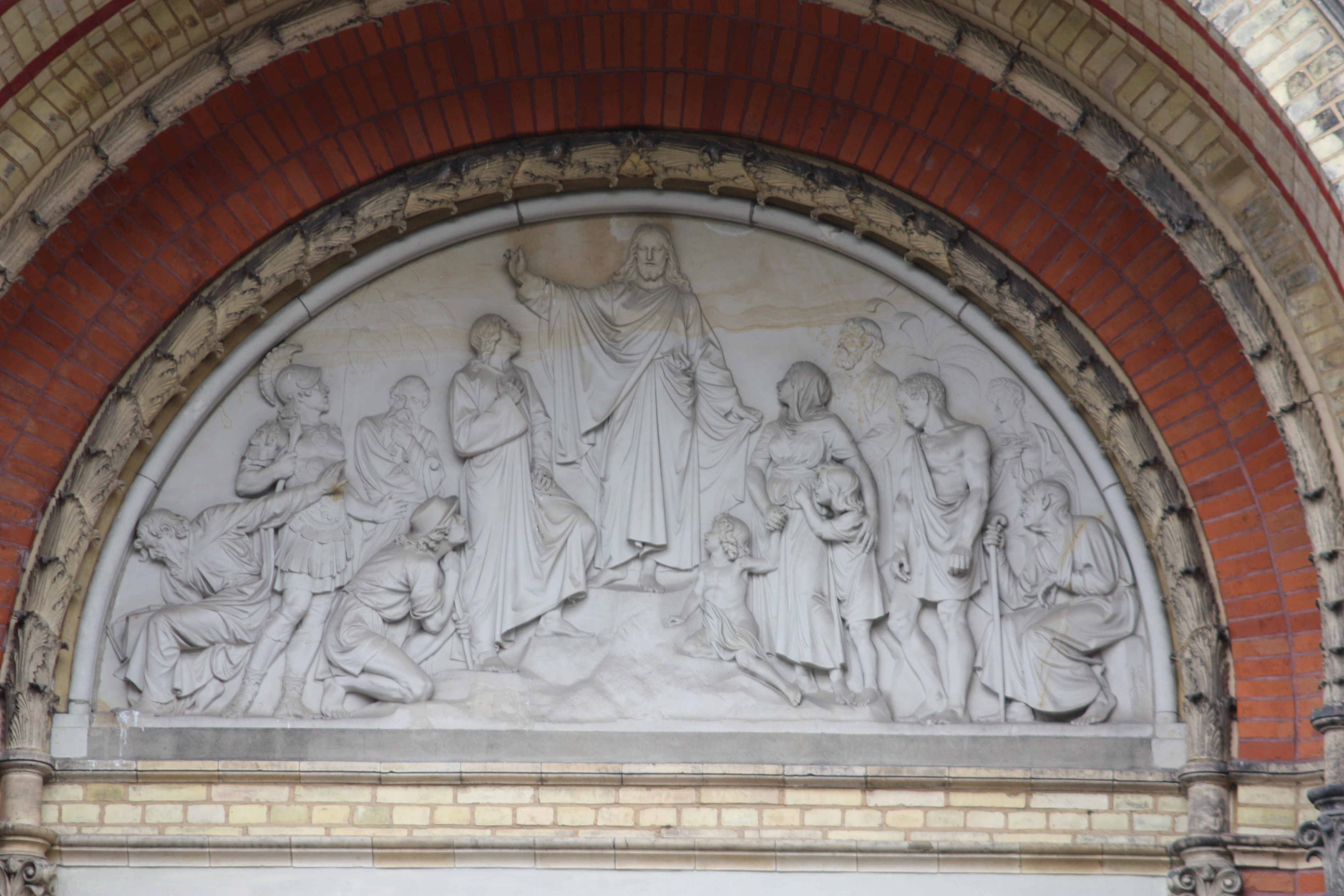 Zionskirche (Berlin) und Zionskirchstraße